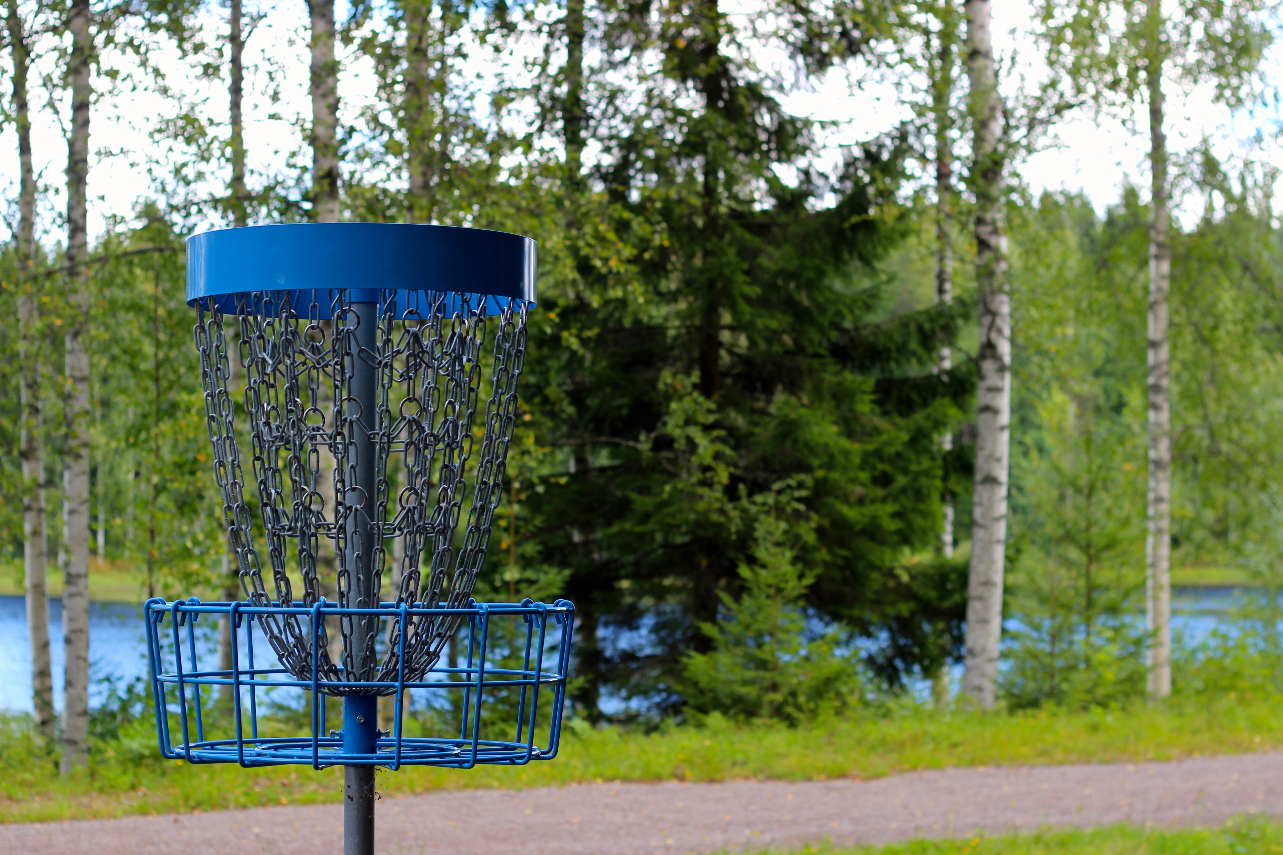 Kuva Mustikkavuoren kisaradan korista